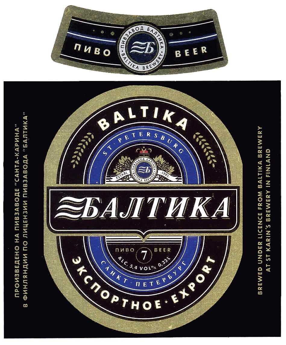 Этикетка от пива Балтика №7